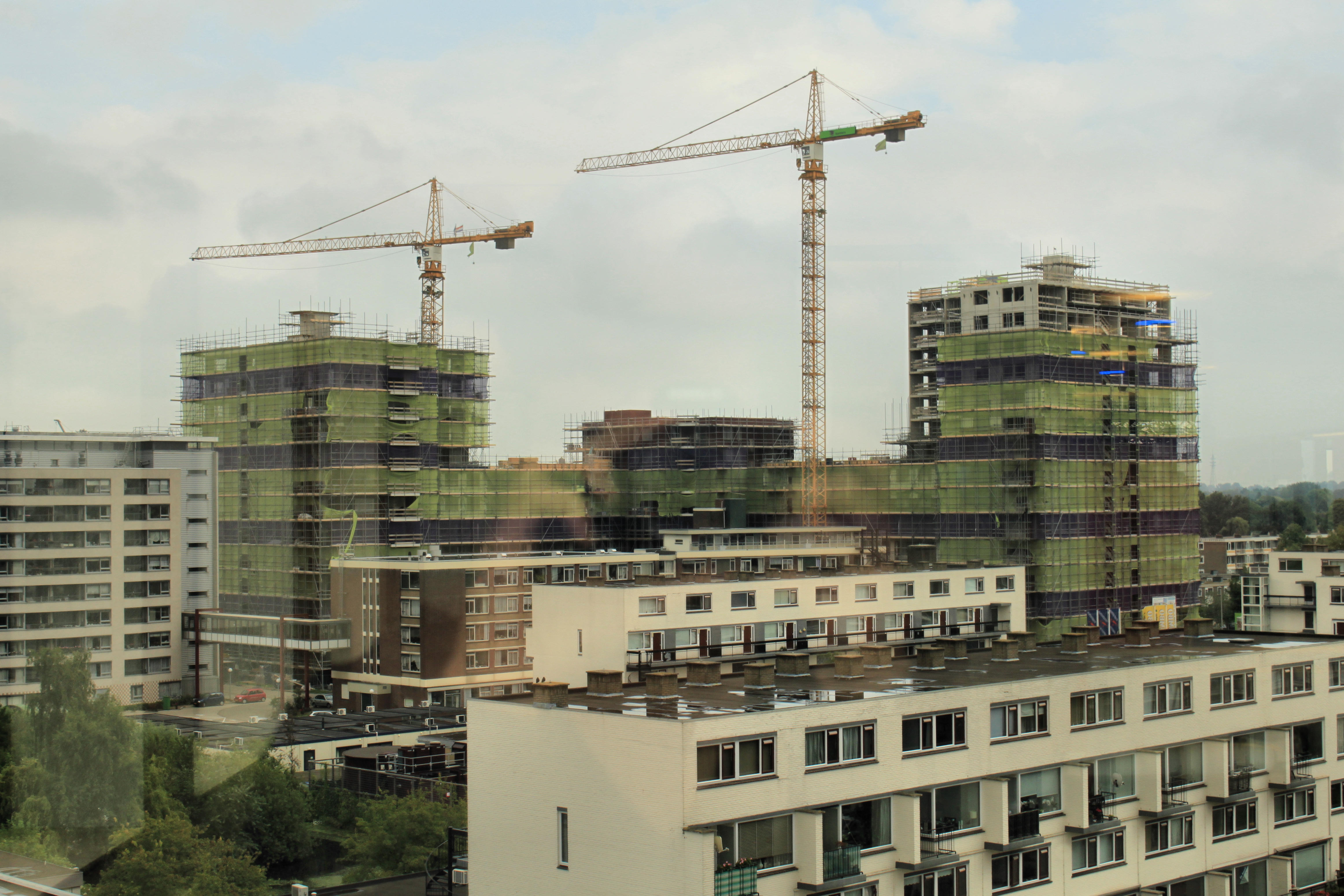 De nieuwbouw van de Vijverhof in aanbouw (2012)